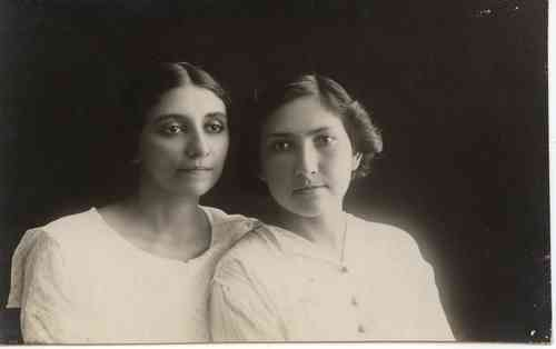 צפורה ורבקה בשמלות לבנות Tzipora Sharett and Rivka Hoz צפורה שרת (מאירוב) ורבקה הוז (שרתוק) 05 התקופה העות'מאנית 5